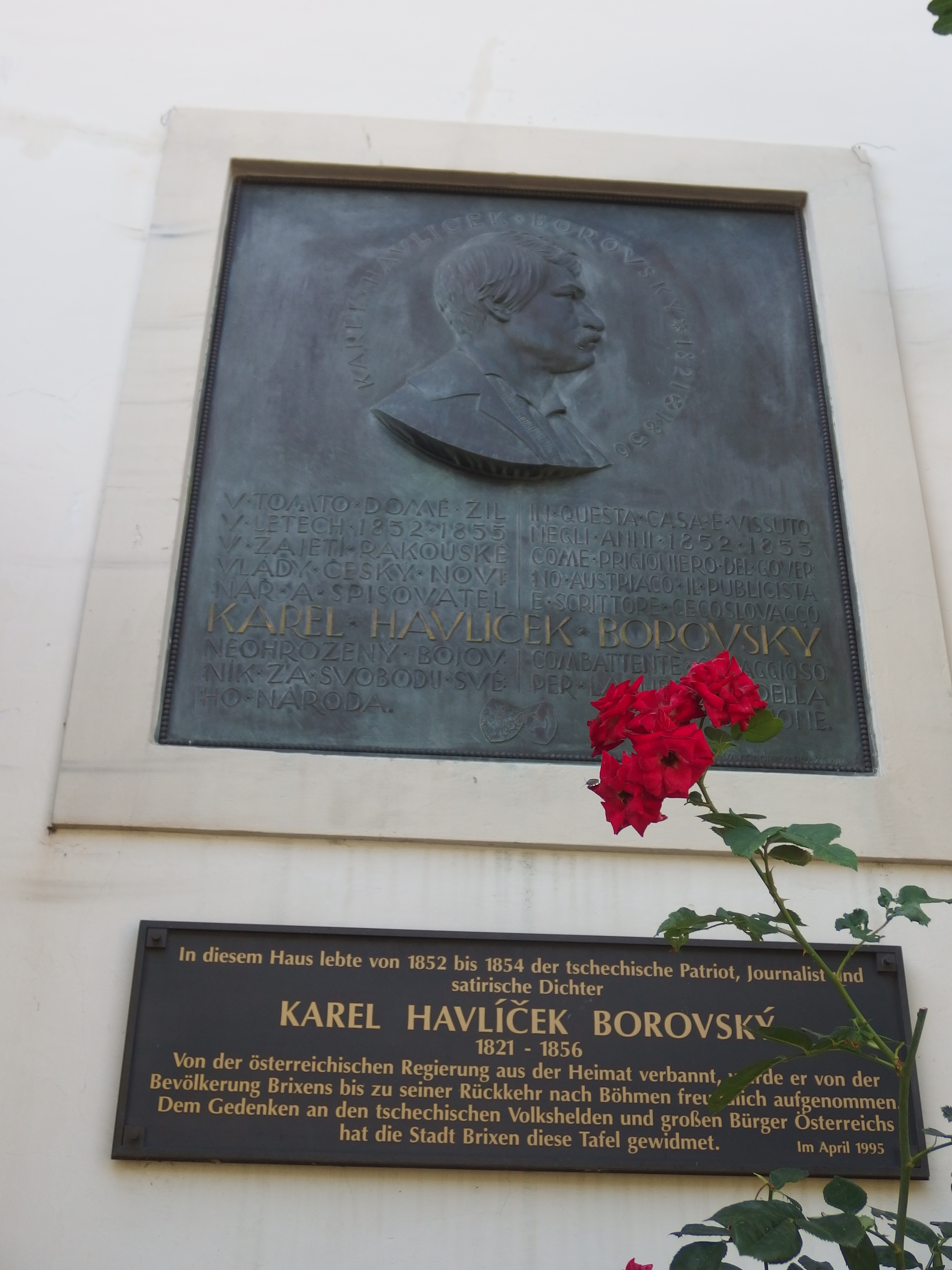 Brixen, Jižní Tyrolsko, Itálie. Dům Karla Havlíčka Borovského.